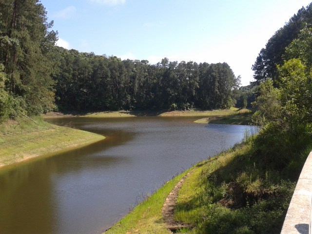 Barragem na estiagem